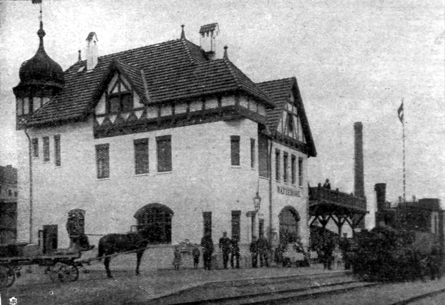 Der Stadtbahnhof in Ratzeburg nach Vollendung der Anbauten